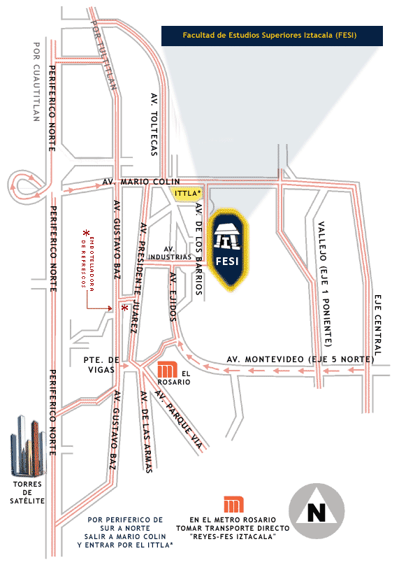 mapa de la fes iztacala